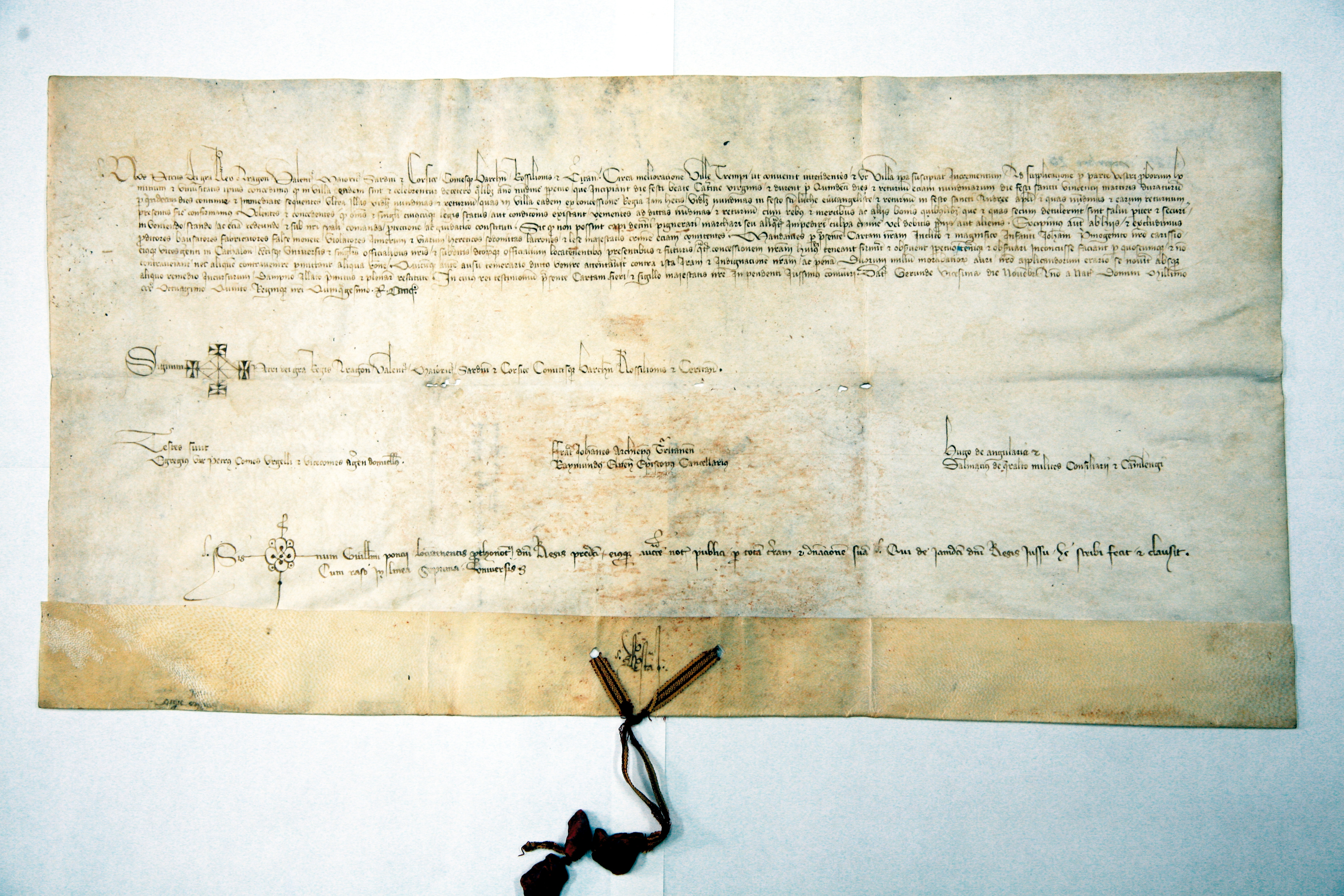 Pergamí nº 35 de la col·lecció de pergamins de l’Arxiu Municipal de Tremp, en la que el notari reial Guillem Ponç, dóna testimoni que el rei Pere concedeix a la vila de Tremp, fira per Santa Caterina (15 dies) i refira per Sant Vicenç (15 dies), la fira de Sant Lluc i la refira de St. Andreu, que ja té.